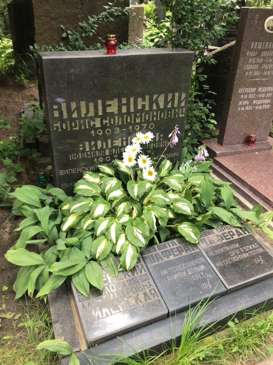 Могила Бориса Виленского и Игоря Шаферана